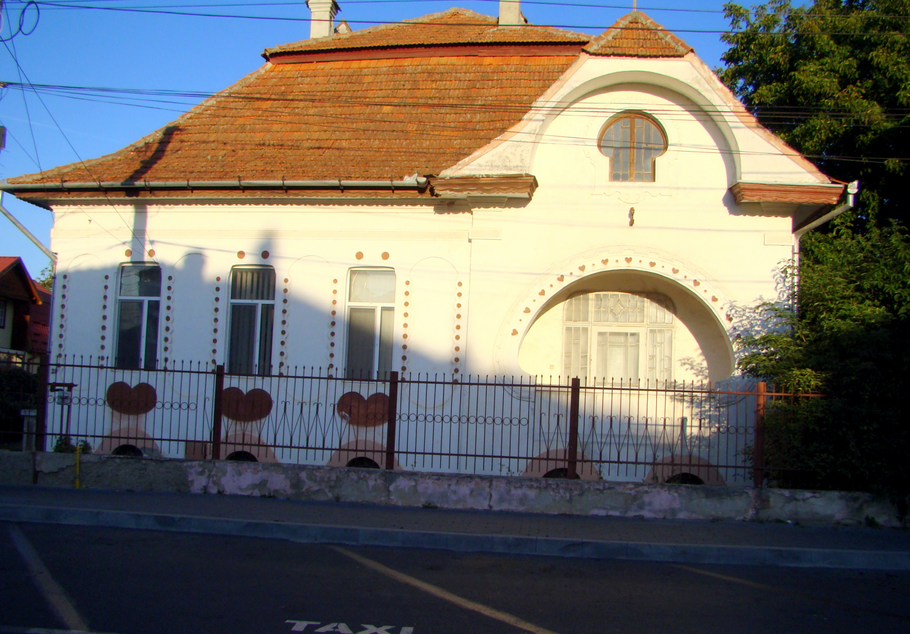 Casă, municipiul Făgăraș, str. Bălcescu Nicolae 29